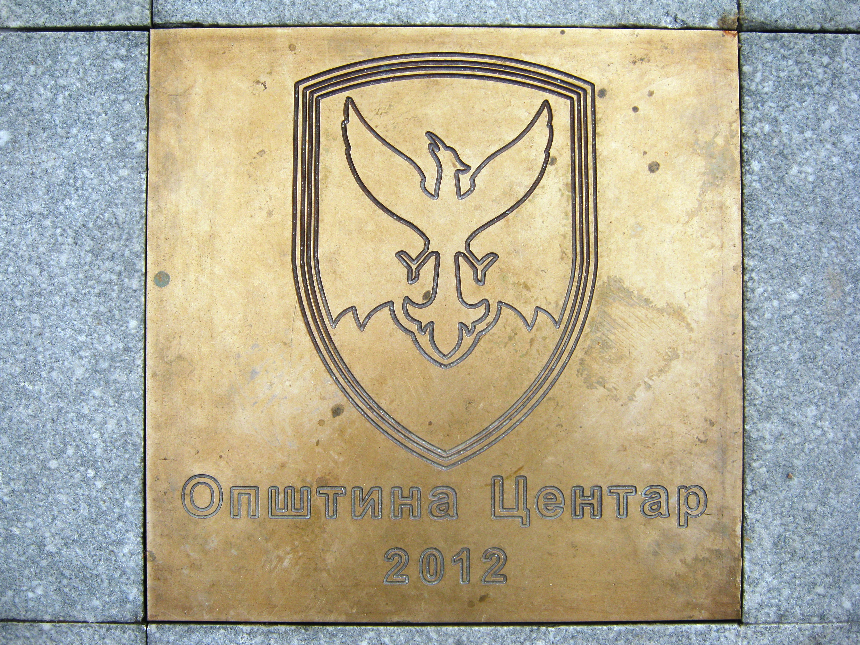 Натписна плоча на општина Центар